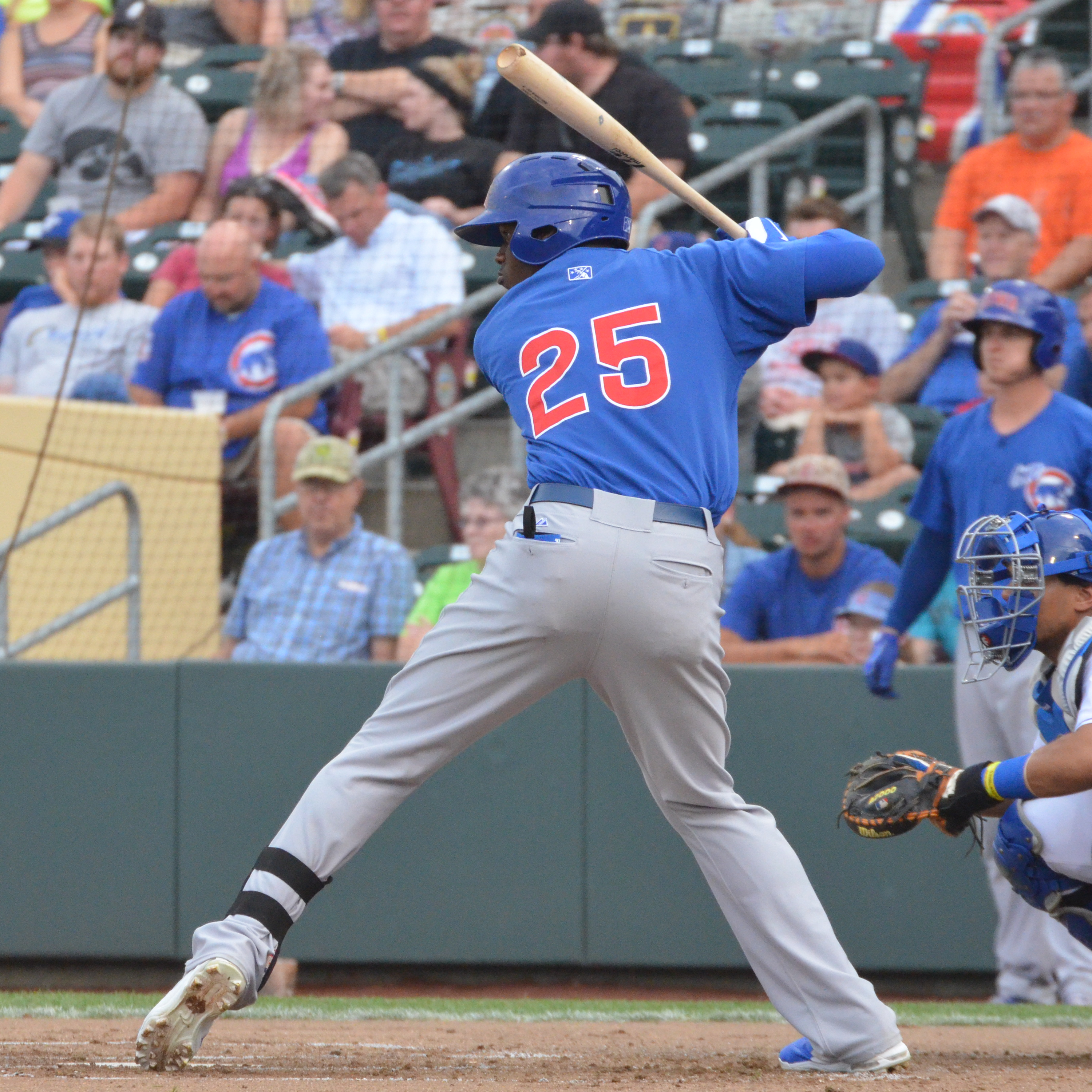 Jorge Soler